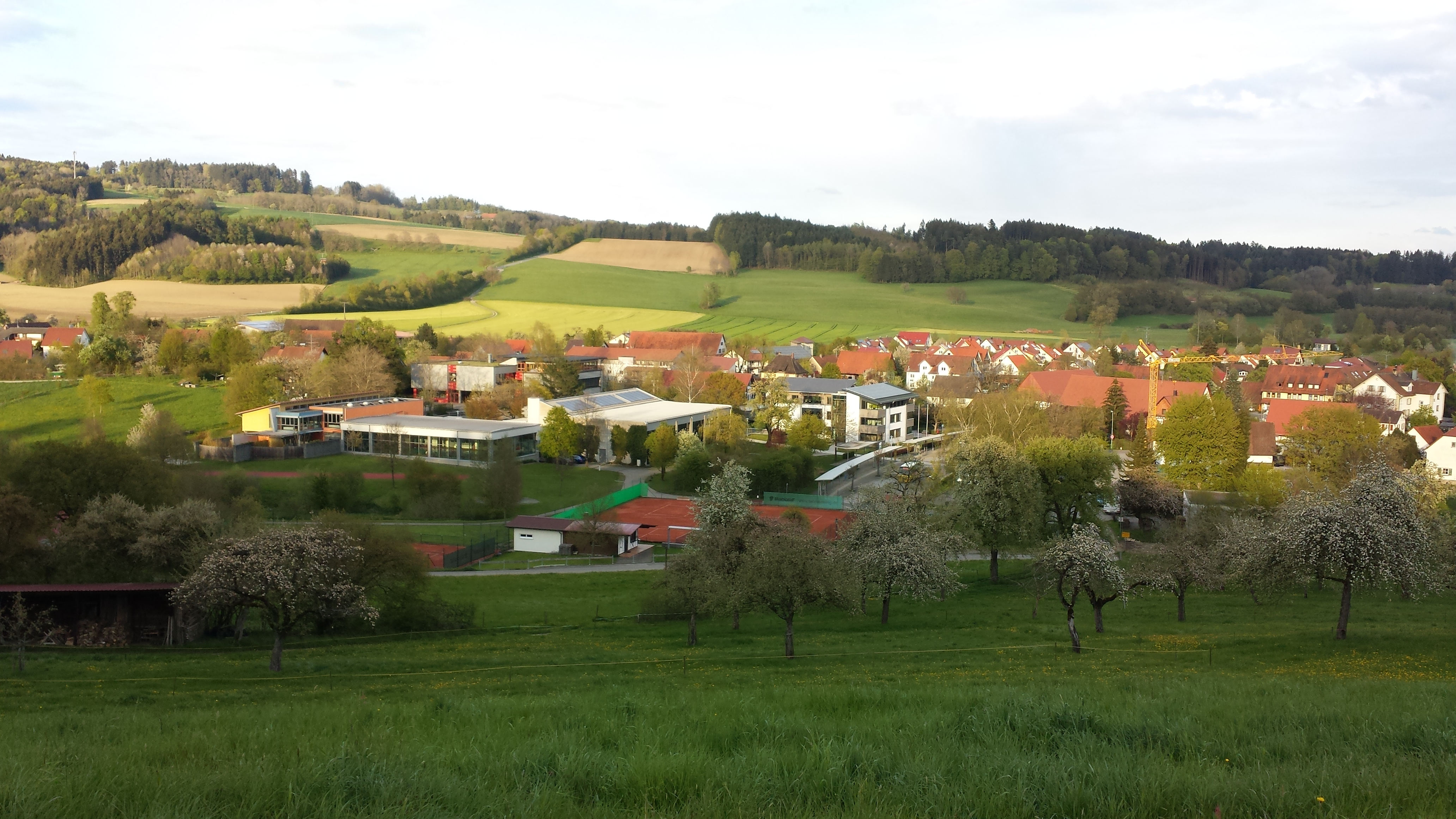 Die Ortsmitte Wittenhofem von einem Hügel aus. Zu sehen von links nach rechts die Saunagelände der Schwimmbades, der Neubau der Grundschule mit Bibliothek, das Schwimmbad, die Grundschule, die Alfons Schmiedmeister Halle, der Tennisplatz, das neue Rathaus, der Busbahnhof, Neubaugebiete, Obstwiesen vor der Gemeindel